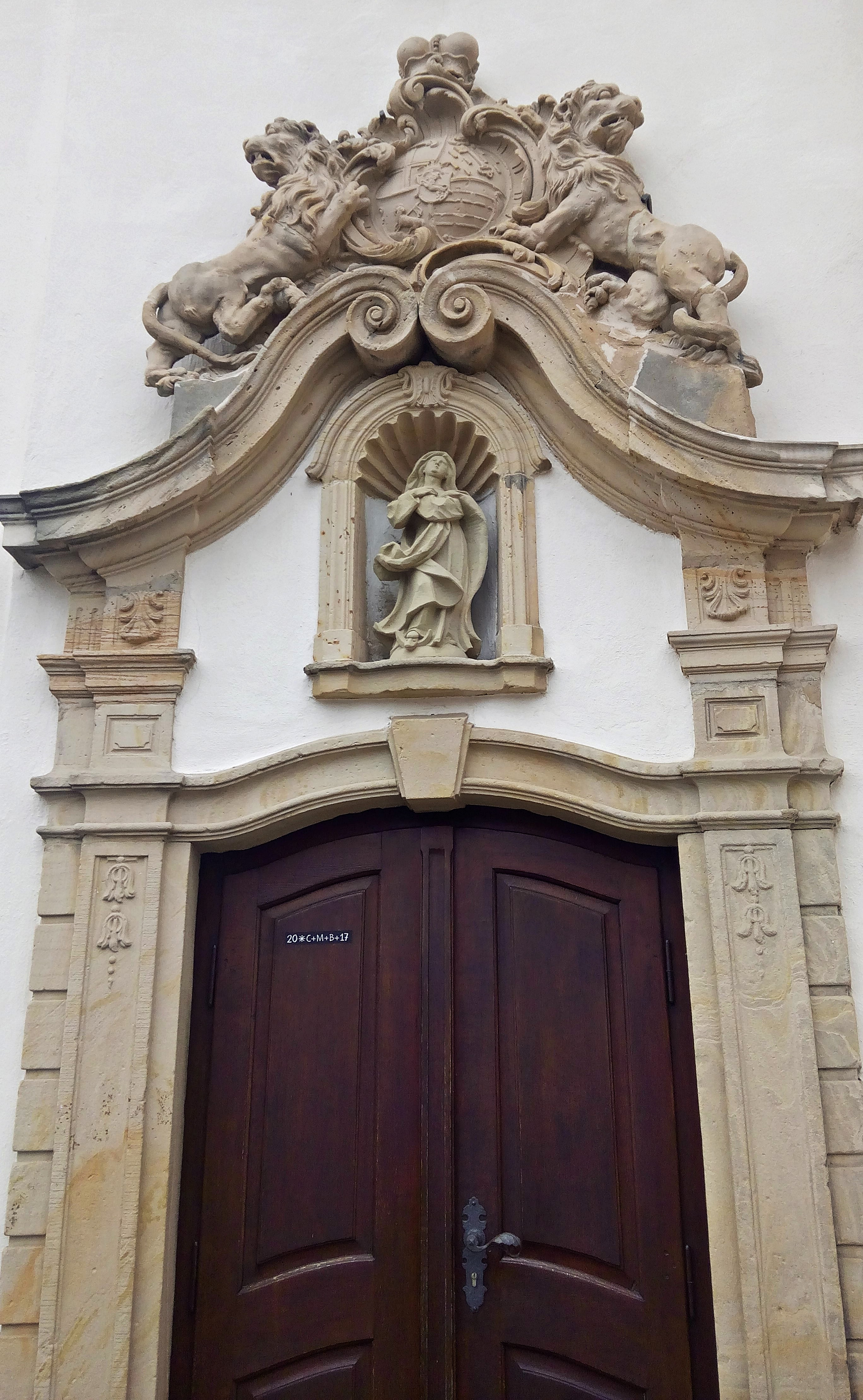 Eppstein St. Cyriakus, Portal zum Seitenschiff